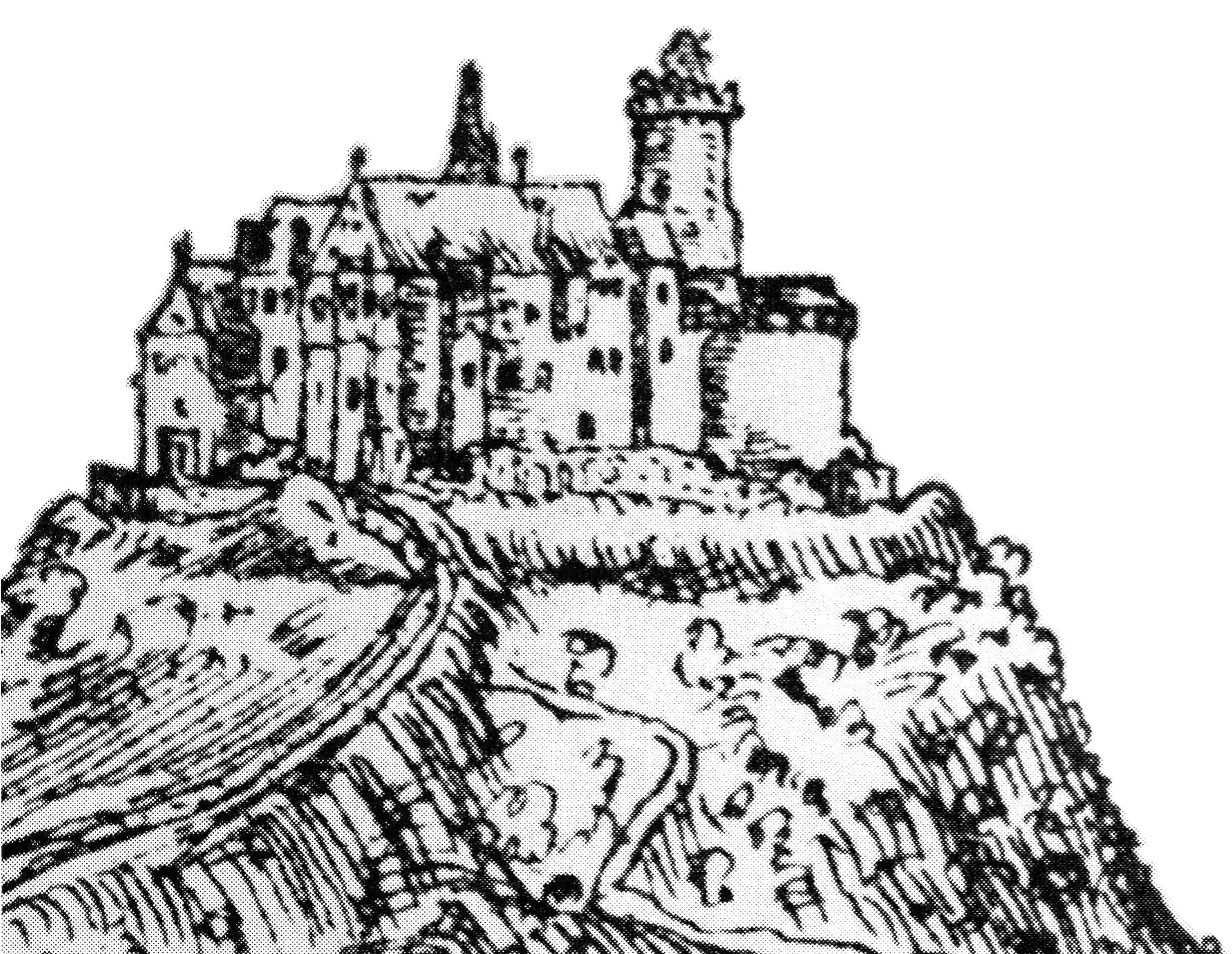 Pohled na hrad Hněvín v Mostě na rytině z roku 1602 (detail).